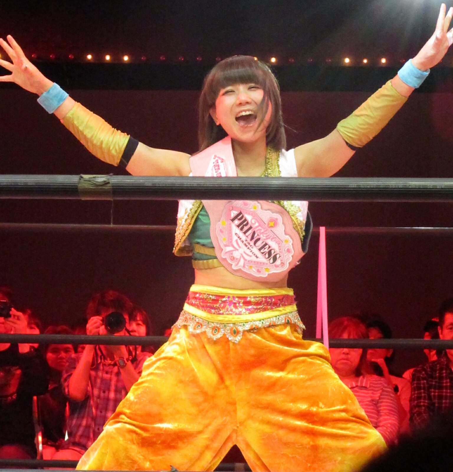 2018年10月13日・大阪